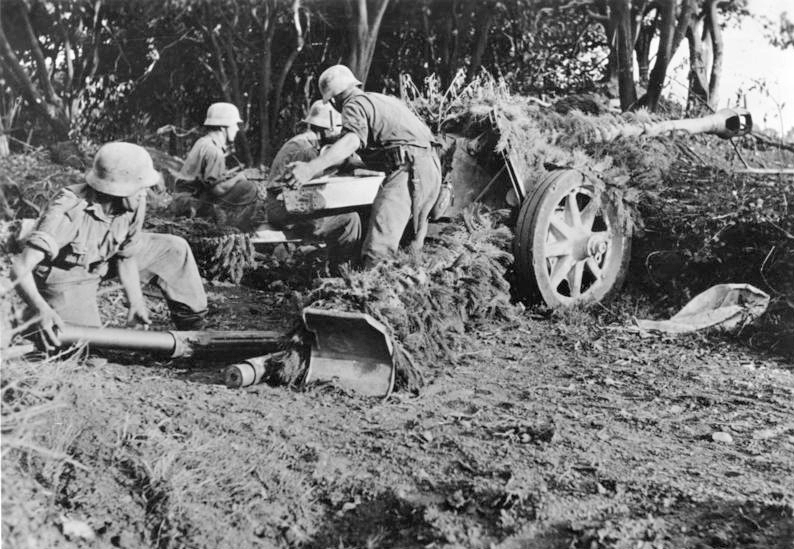 Italien, Soldaten beim Laden einer Pak ADN-ZB-Archiv II. Weltkrieg 1939-45 An der Front in Italien, Ende September 1943: Ein Pak-Geschütz der faschistischen deutschen Wehrmacht in Stellung im Raum Salerno. (Aufnahme: Lüthge) 4683-43 [Scherl Bilderdienst]